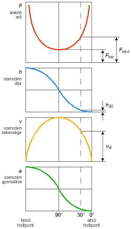 Forgattyús sajtó mozgásfüggvényei